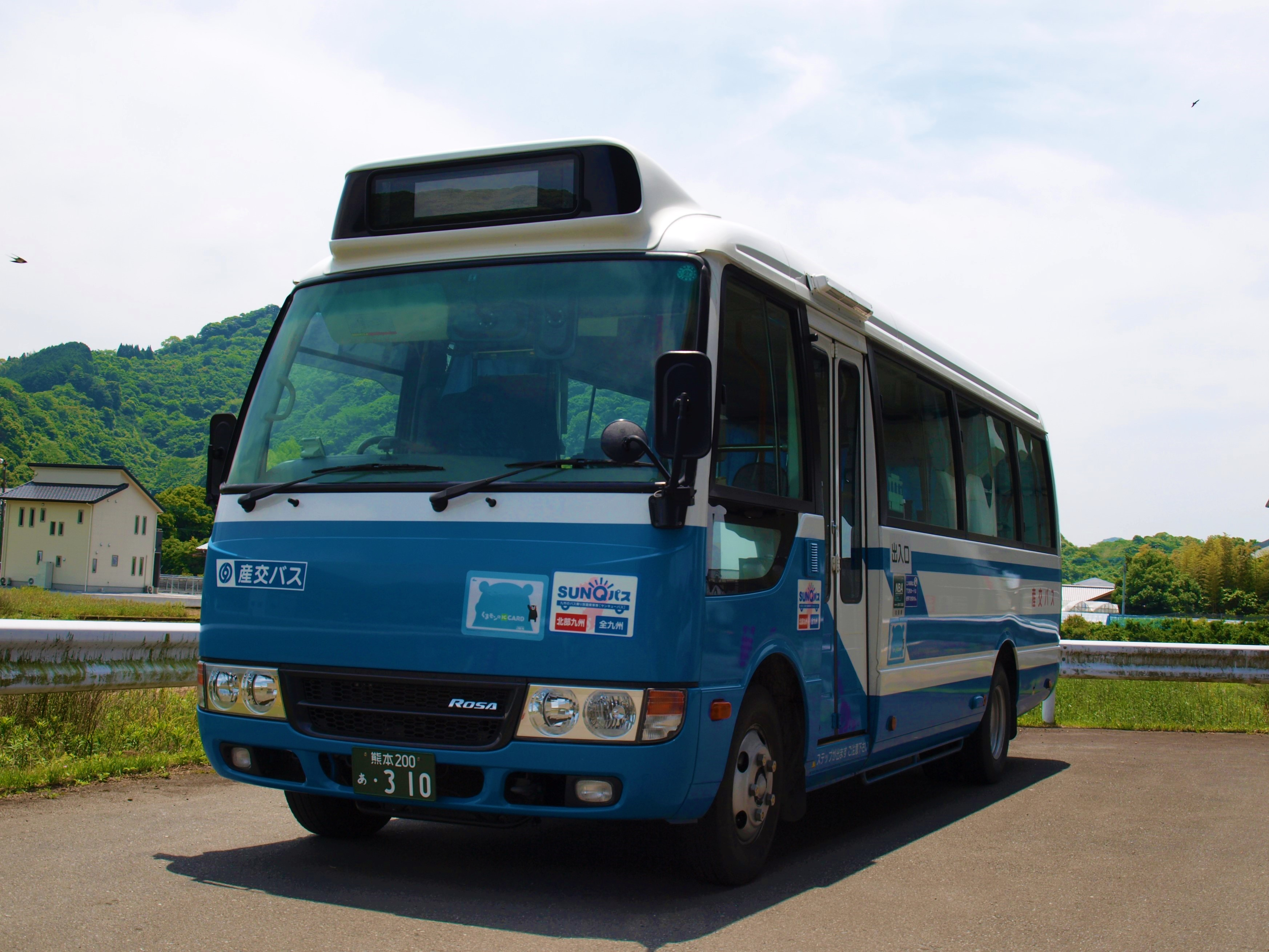 産交バスの閑散路線用三菱ローザ、道の駅たのうらにて